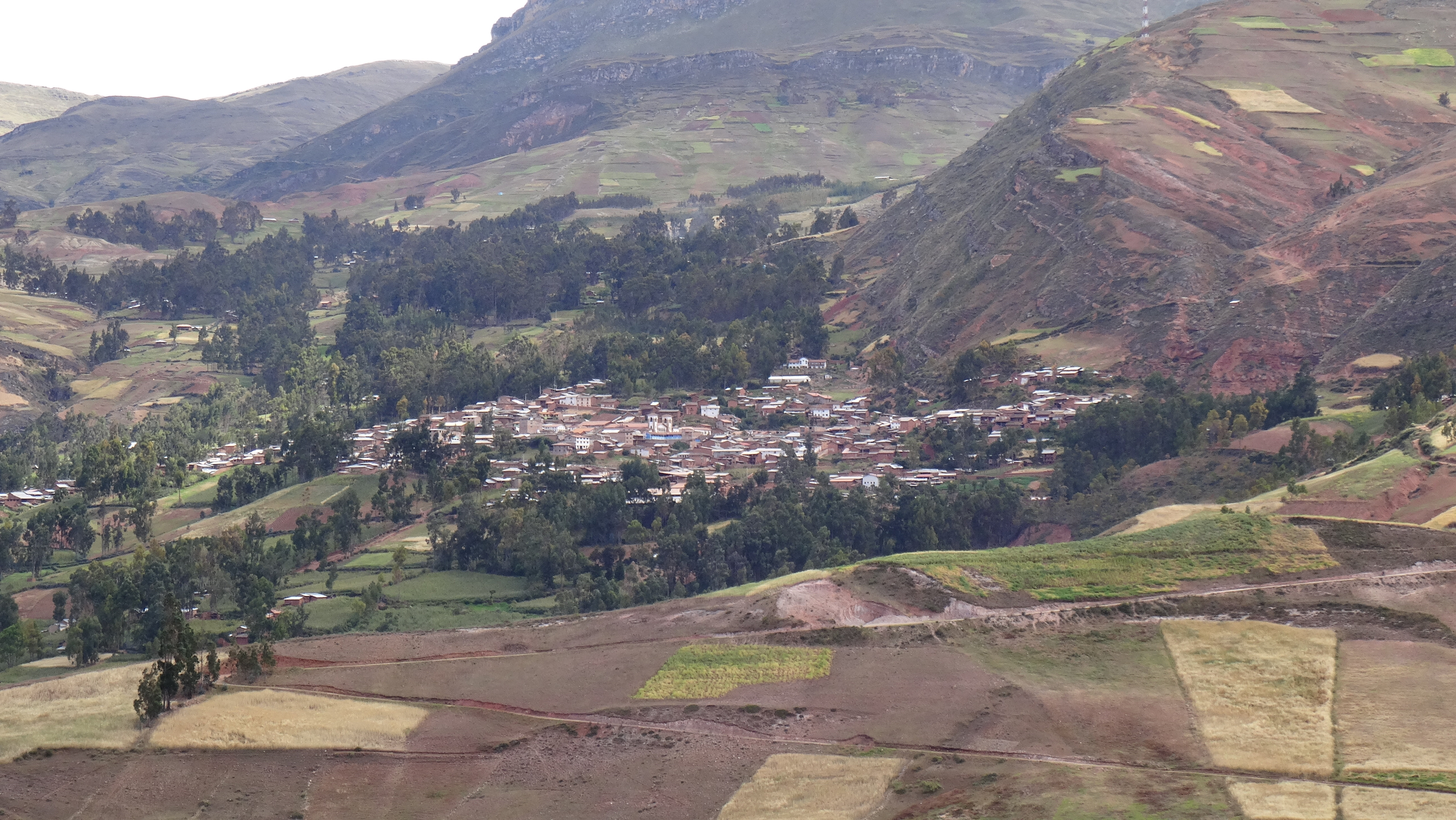 Vista desde la trocha al cerro Yarkan.